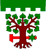 Bohdašín (RK), znak.Ve stříbrném štítě pod zelenou cimbuřovou hlavou vykořeněná lípa přirozené barvy s kmenem podloženým položeným červeným kladivem, tloukem nahoru, s topůrkem vlevo přeloženým zelenou hvězdou.